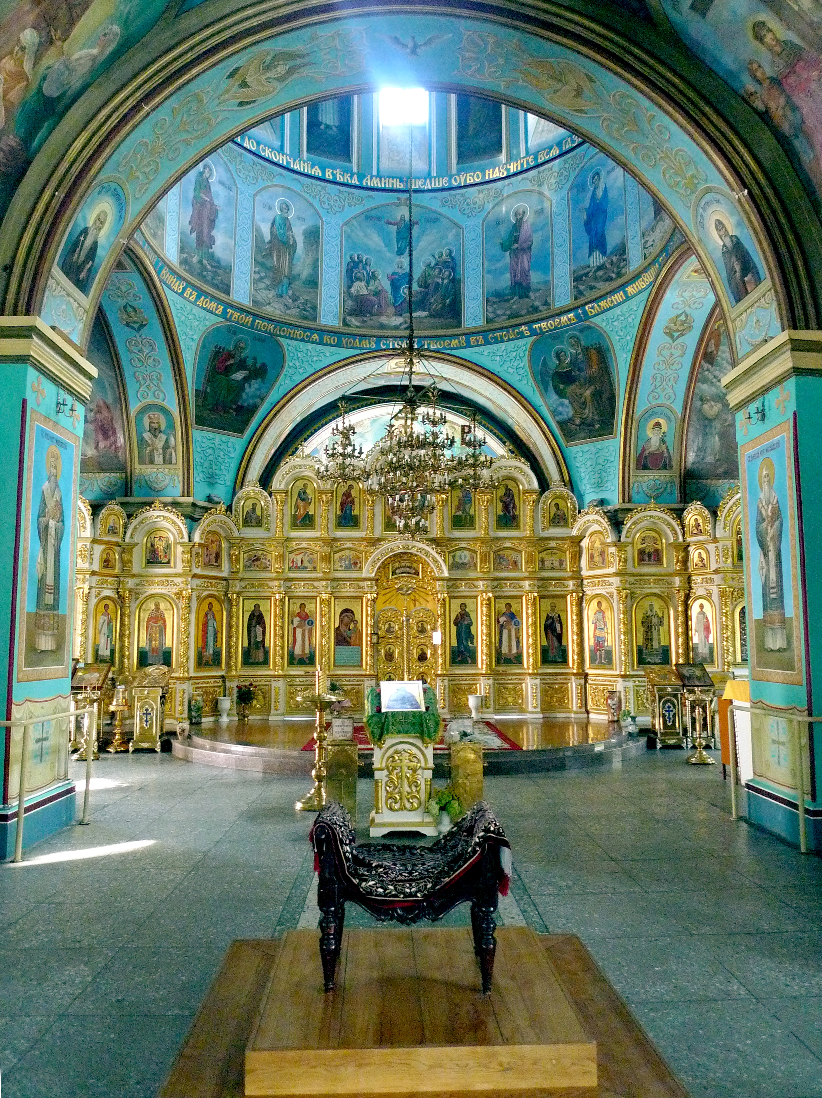 Интерьер Казанского собора в Волгограде